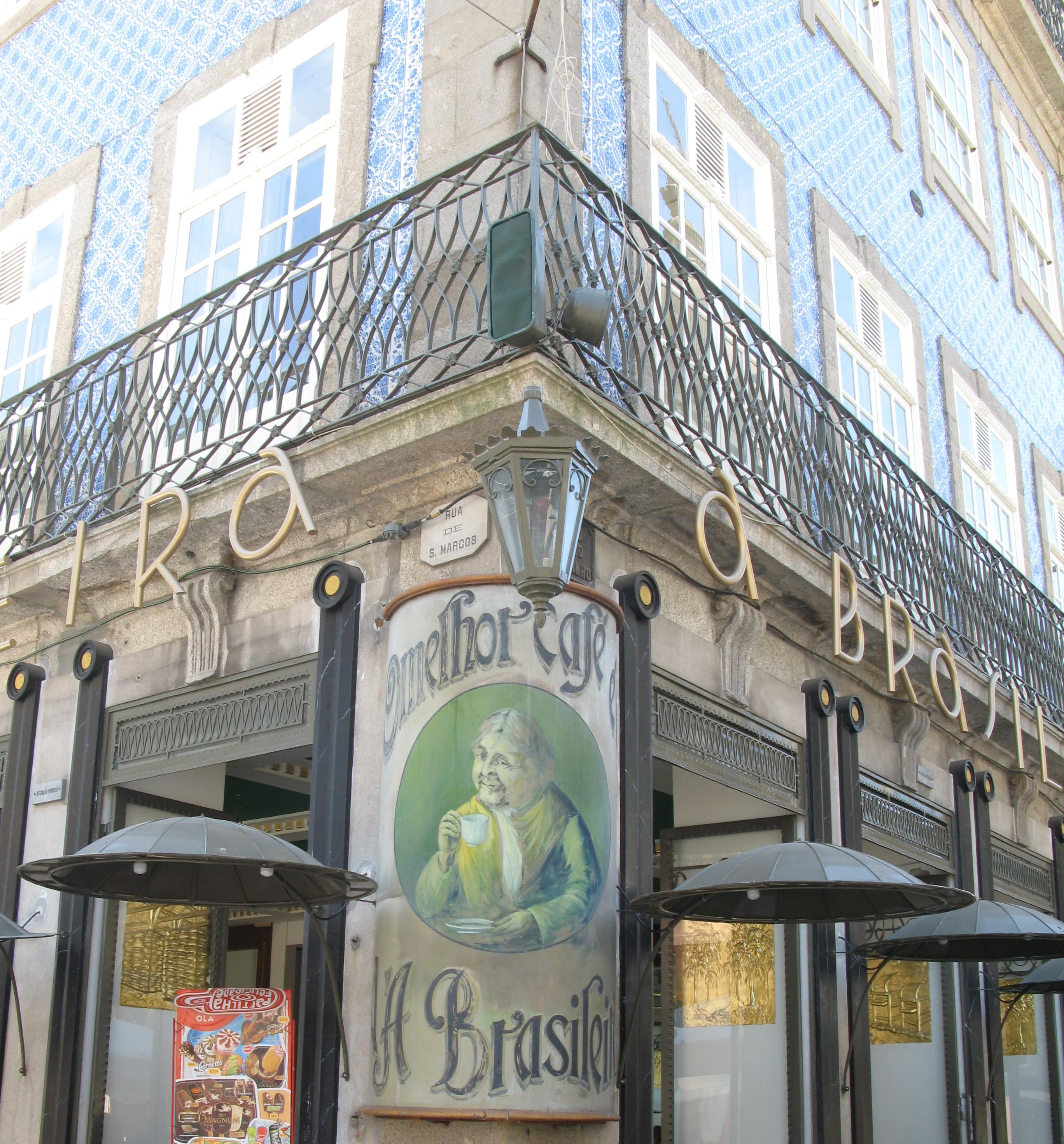 A Brasileira, um dos cafés mais antigos da cidade de Braga.